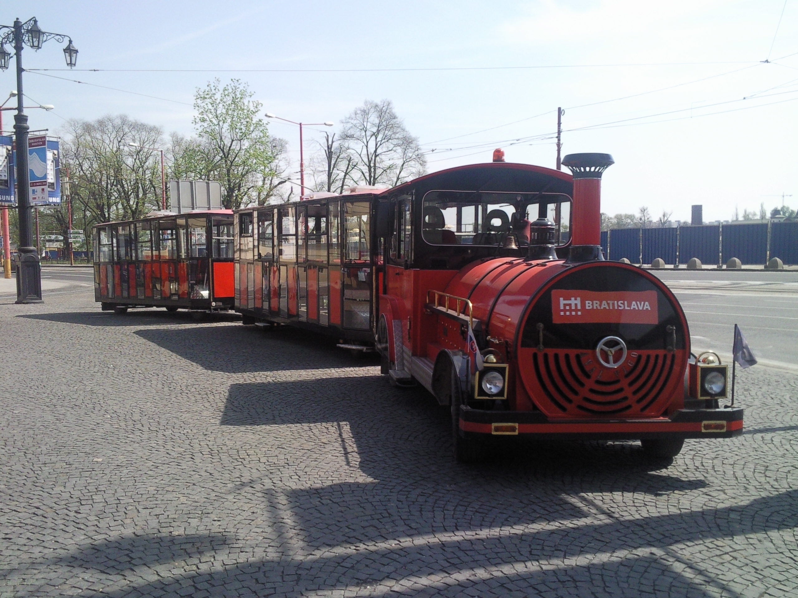 Bratislava tourist train at Ľudovít Štúr Square